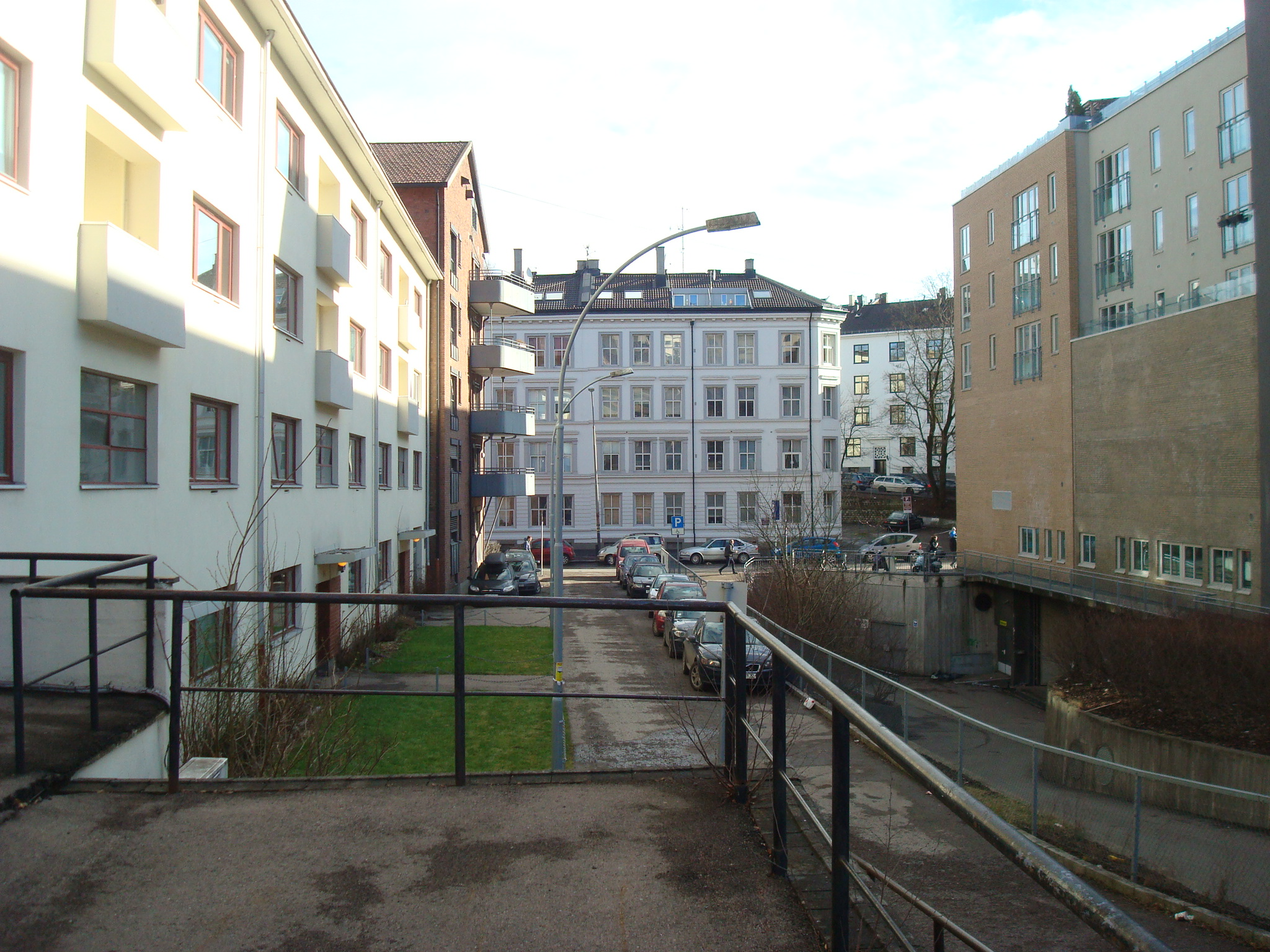 Landstads gate i Oslo, 2015. Hele gateløpet, sett fra Uelands gate over til Kingos gate.